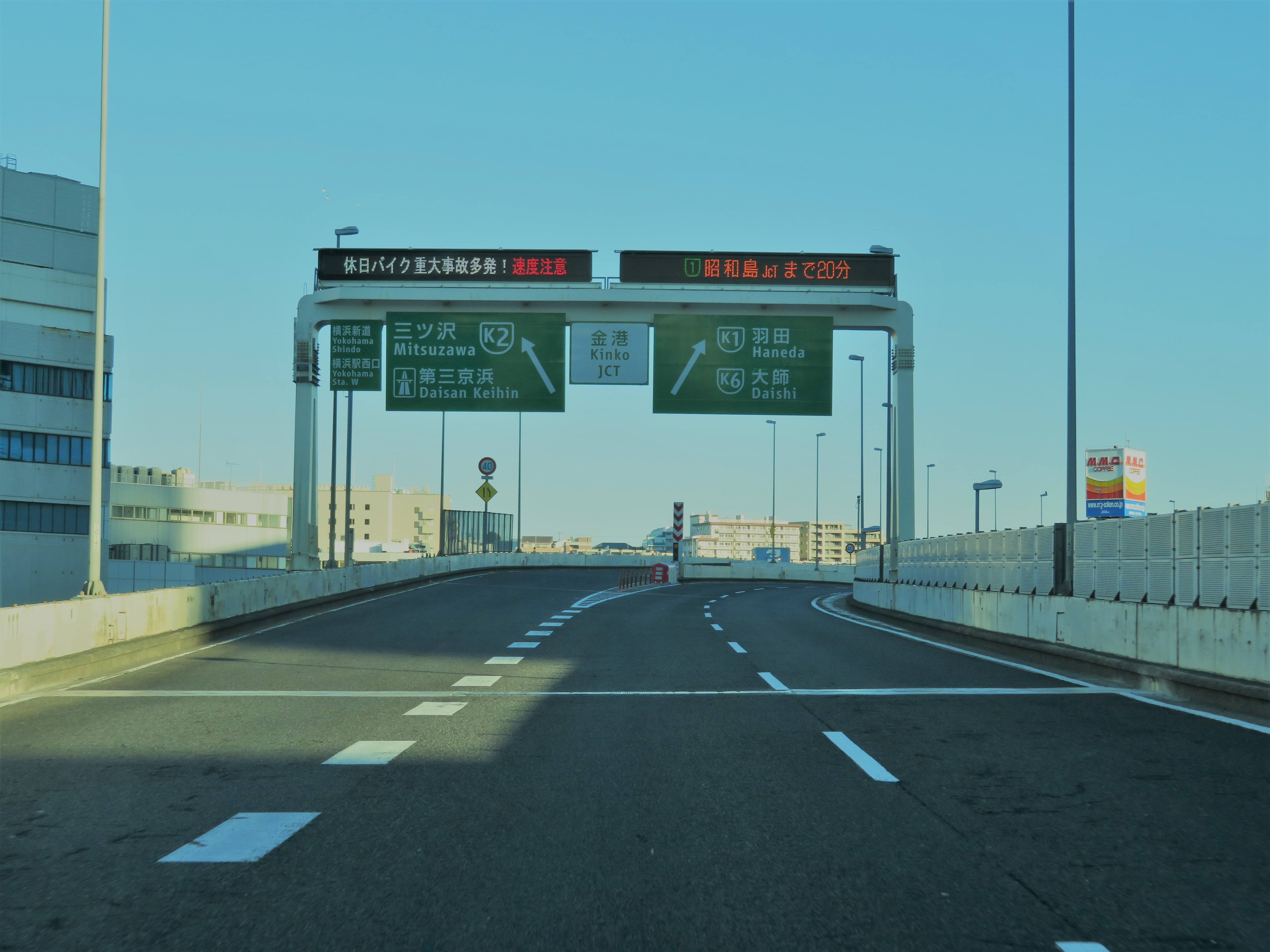 都高速道路神奈川1号横羽線金港JCT（横羽線上り線側分岐付近）